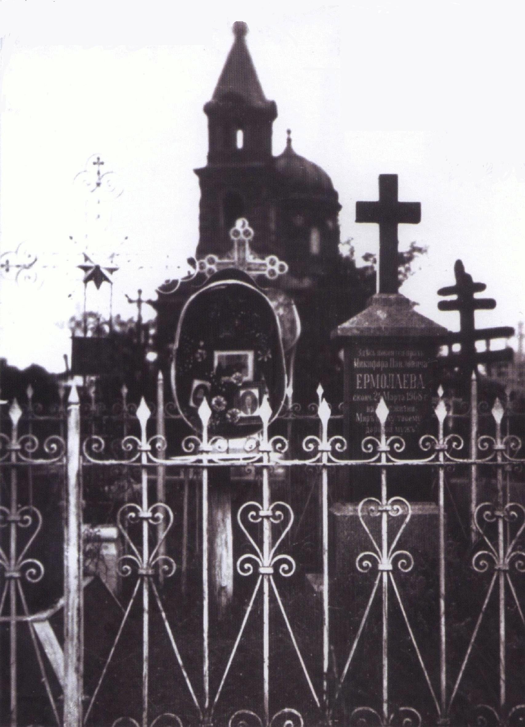 Вознесенская церковь(на заднем фоне)